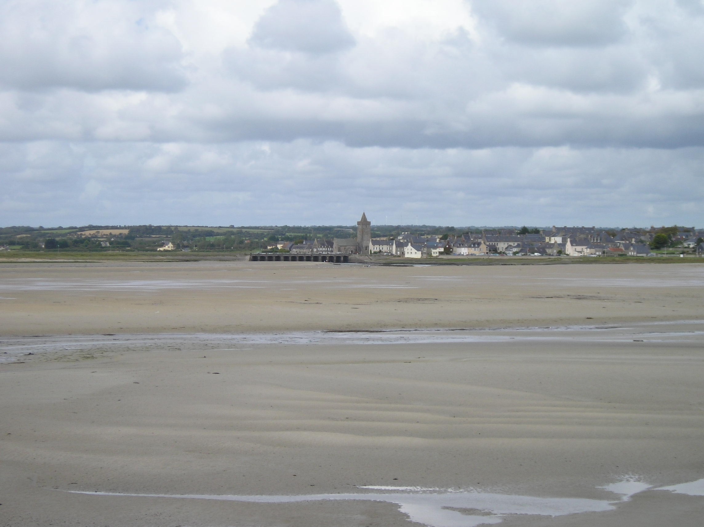 Vue générale de Portbail